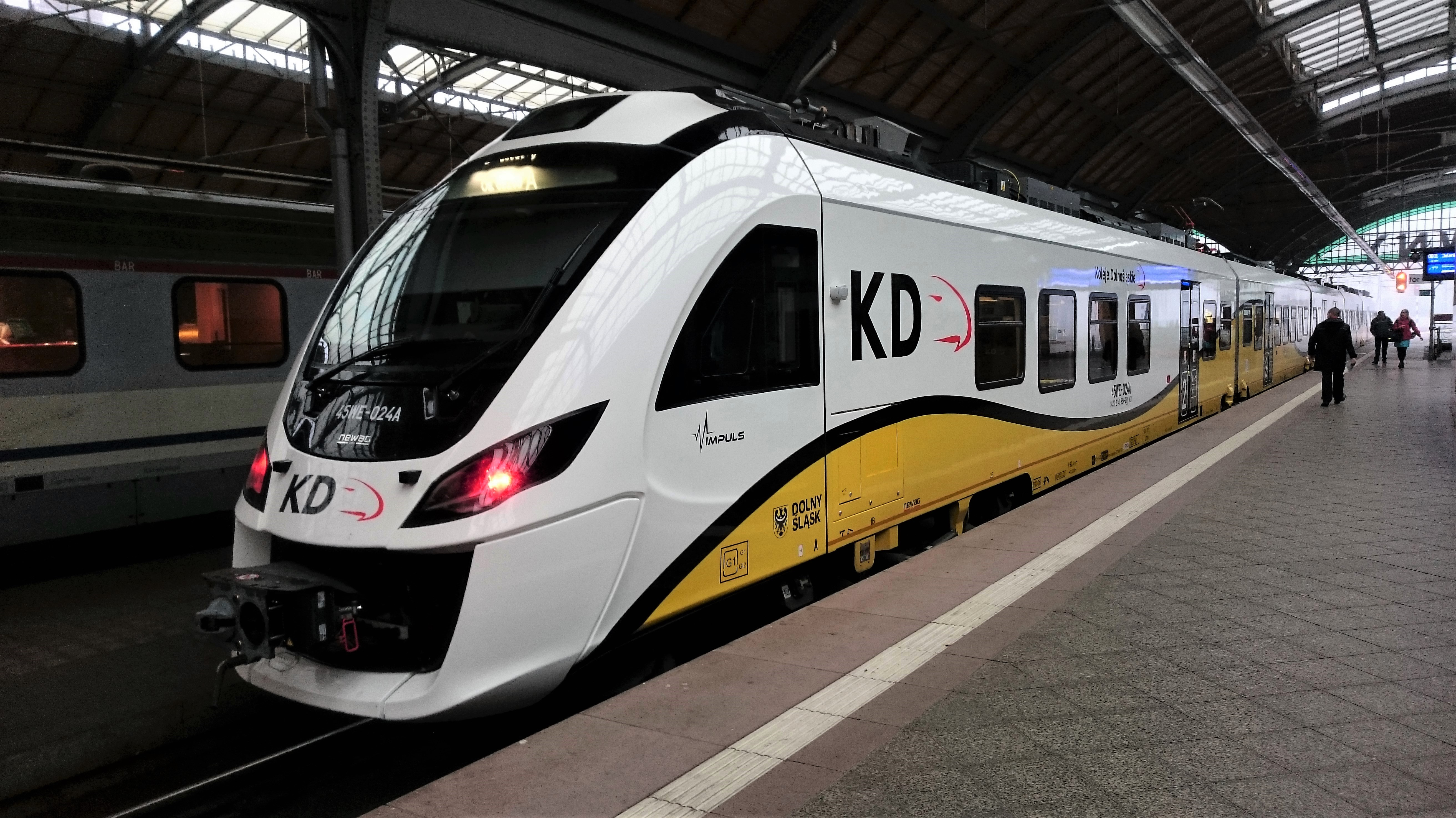 EZT Newag Impuls 45WE-024 przewoźnika Koleje Dolnośląskie na stacji Wrocław Główny